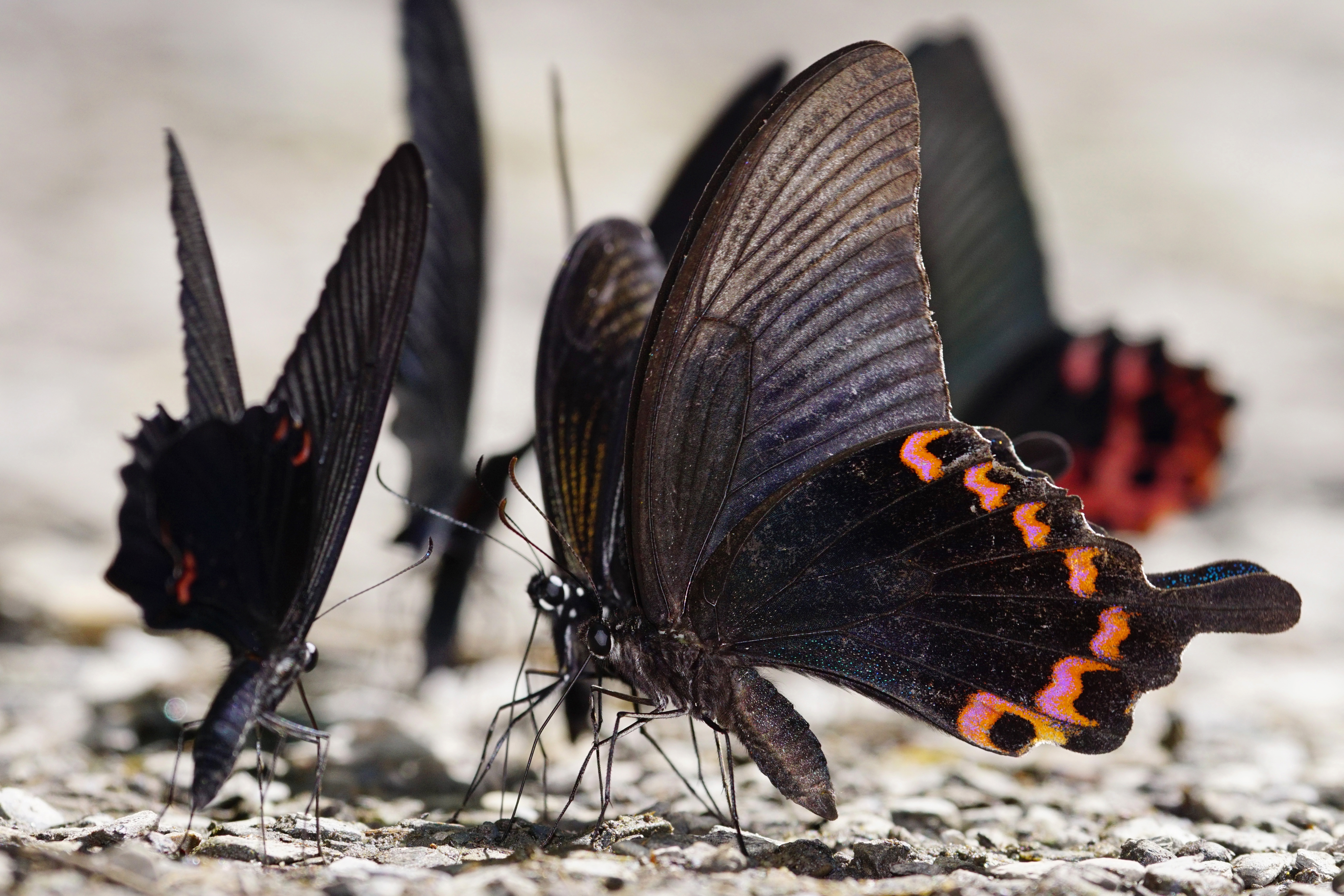 穹翠鳳蝶 Papilio dialis tatsuta